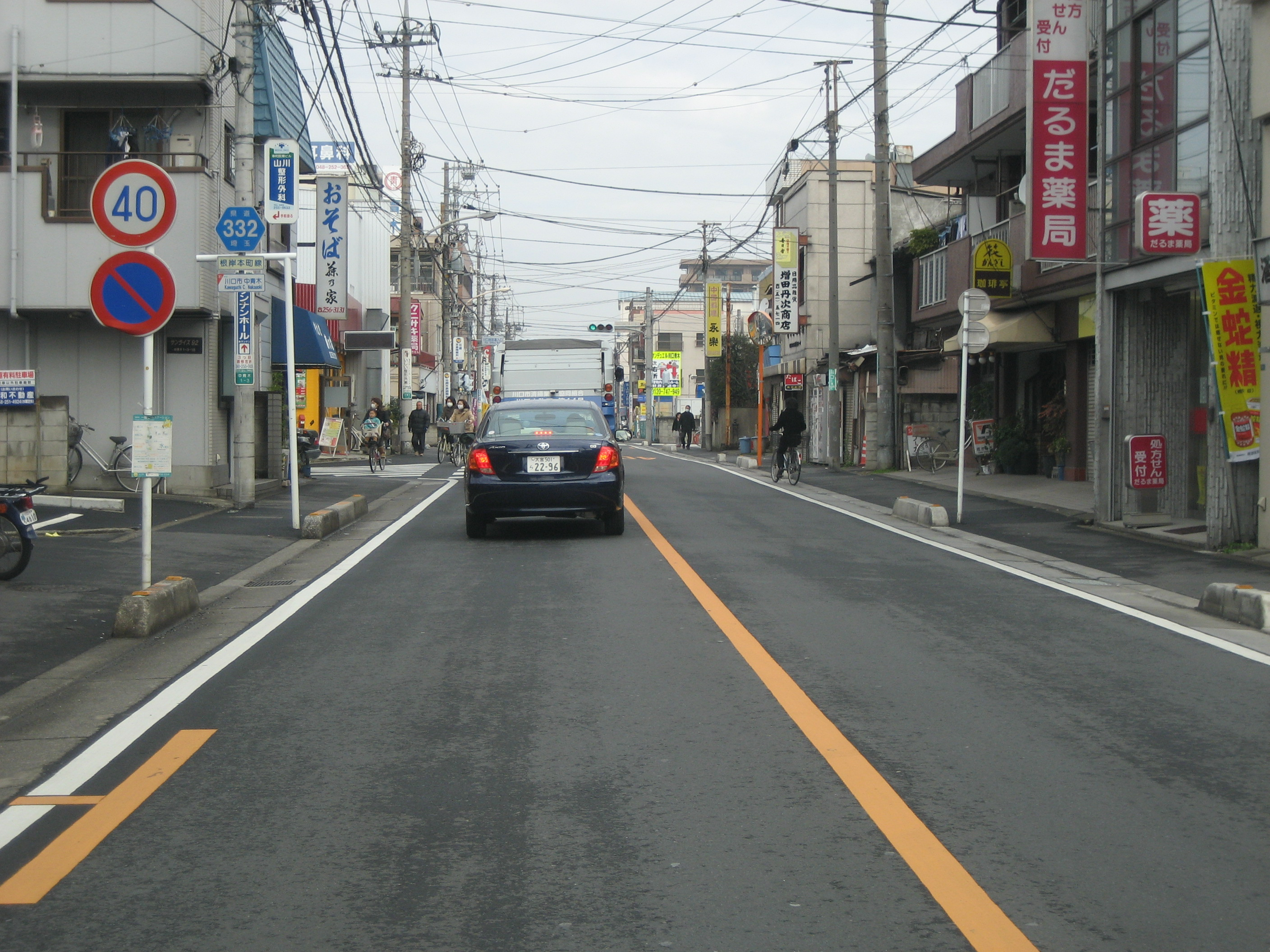 埼玉県道332号線川口市内